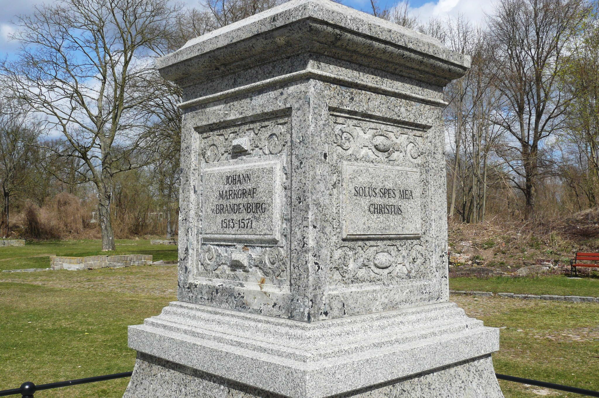 Ruiny Starego Miasta w Kostrzynie n/Odrą.